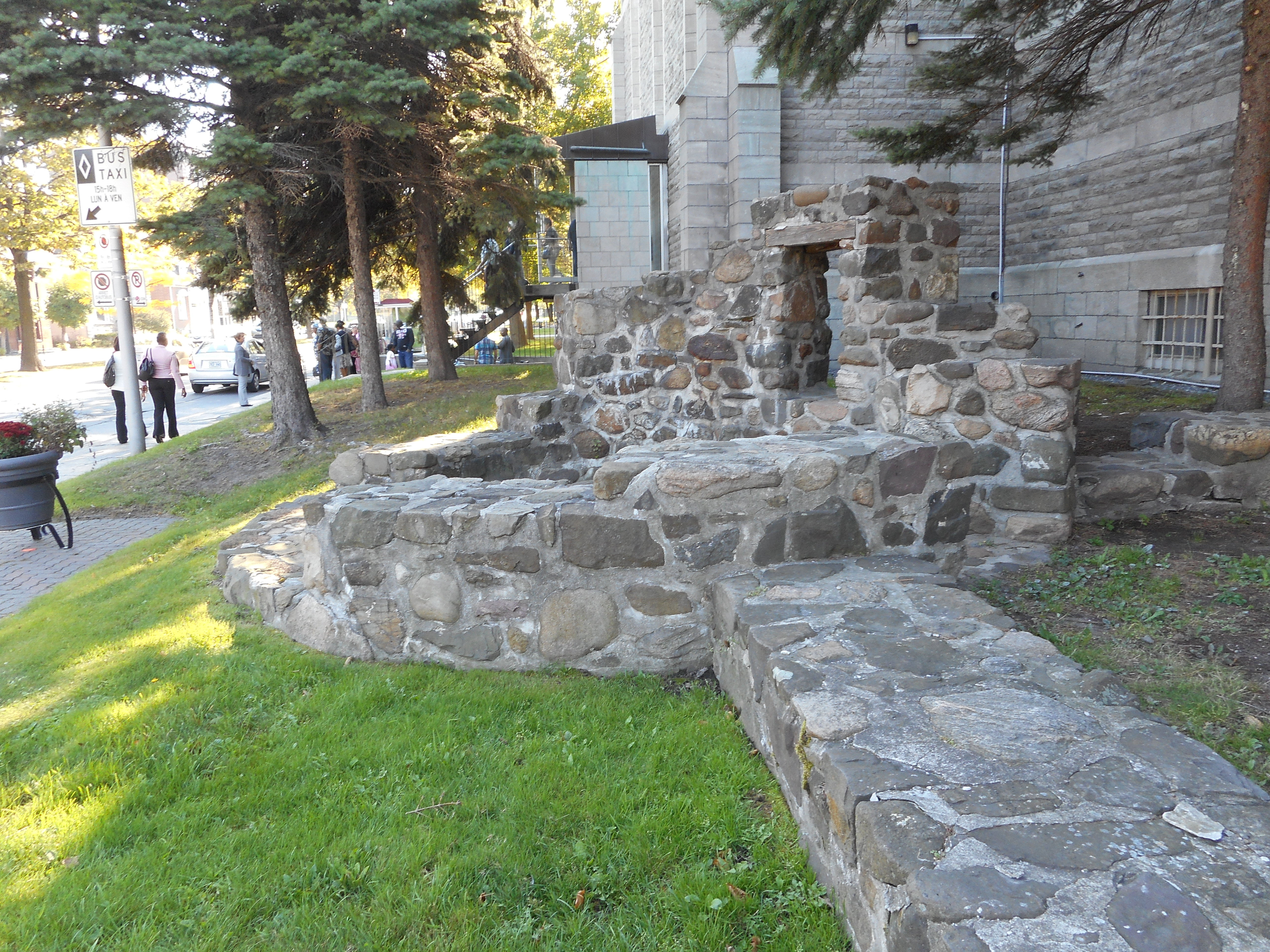 Vestiges du château fort de Longueuil, près de la cocathédrale Saint-Antoine-de-Padoue, à Longueuil. Ils ont été trouvés en 1971 sous le chemin de Chambly, à quelques pas de là. marigot.ca